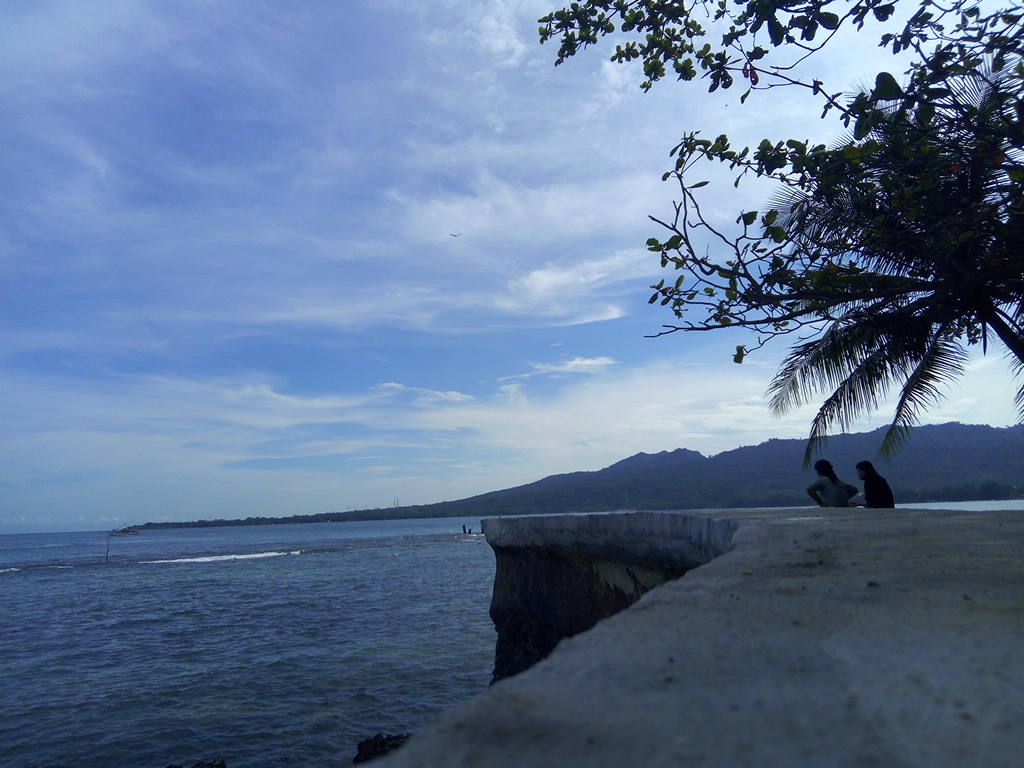 Pantai carita adalah suatu tempat liburan yang cocok untuk keluarga.